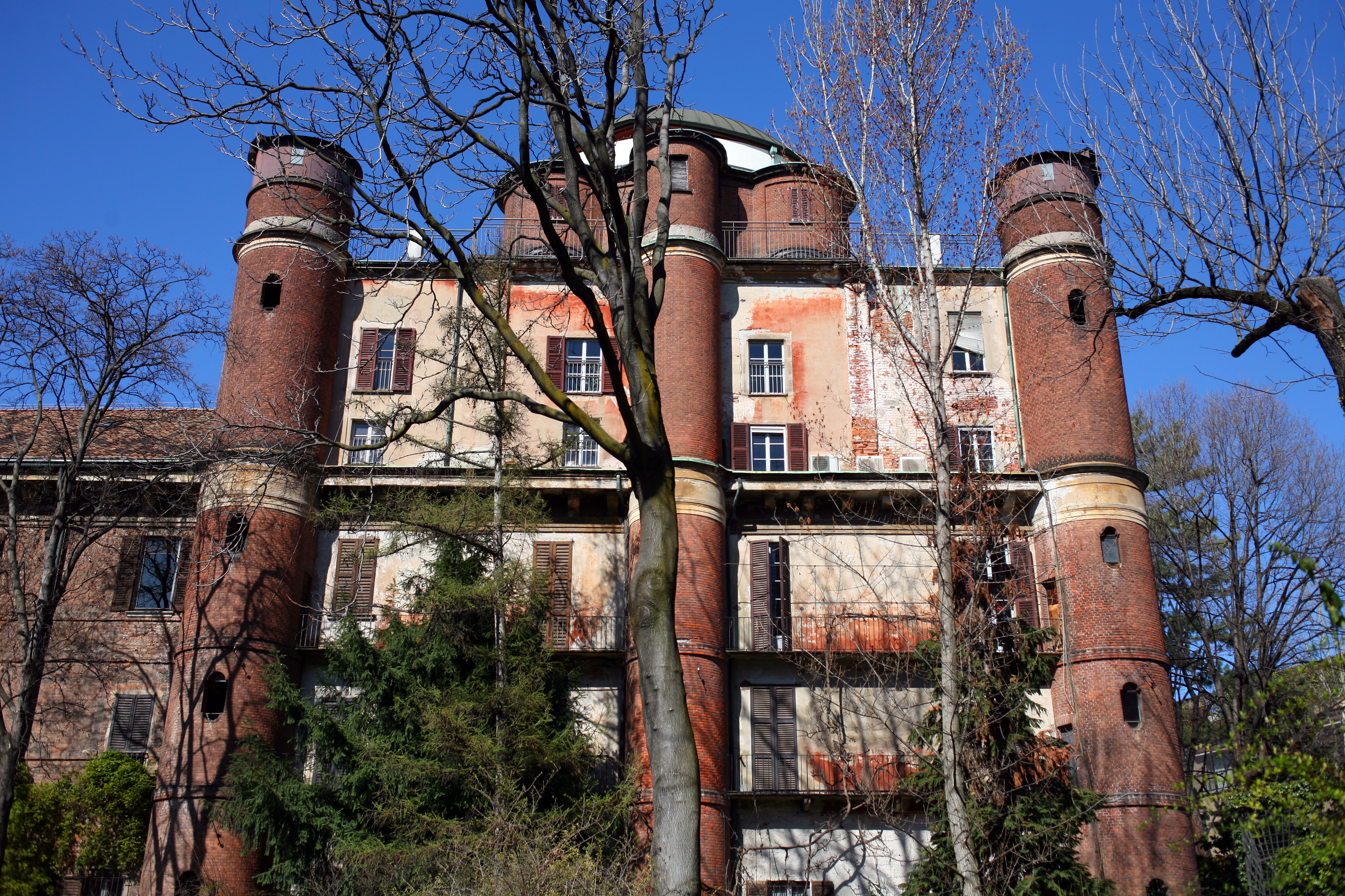 L'antico osservatorio astronomico di Brera a Milano